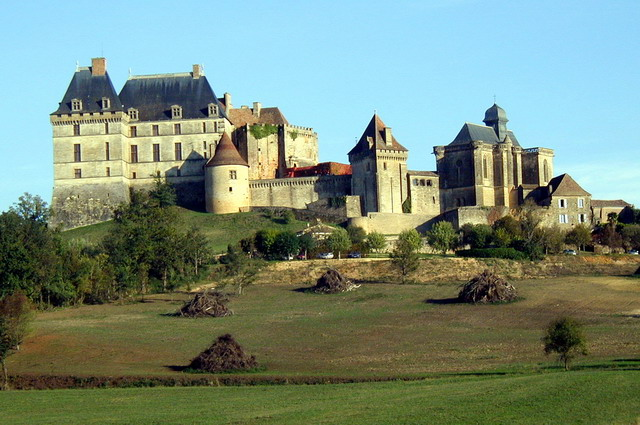 Biron